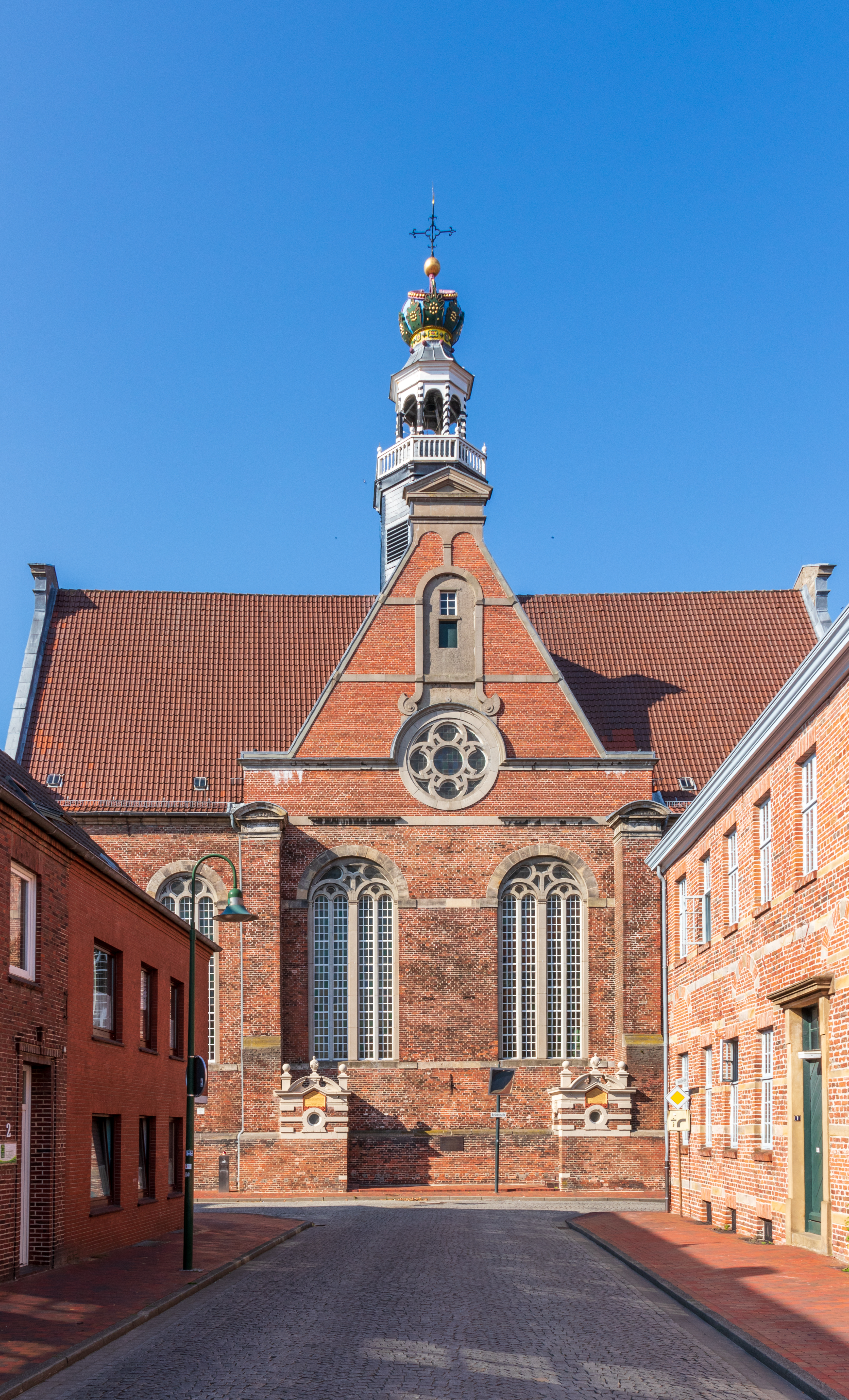 Blick auf die Neue Kirche Emden. Die Neue Kirche in Emden (Ostfriesland) ist eine evangelisch-reformierte Predigtkirche. Sie wurde in den Jahren 1643–1648 als erster nachreformatorischer Kirchenbau in Norddeutschland im gemäßigten Barockstil errichtet.